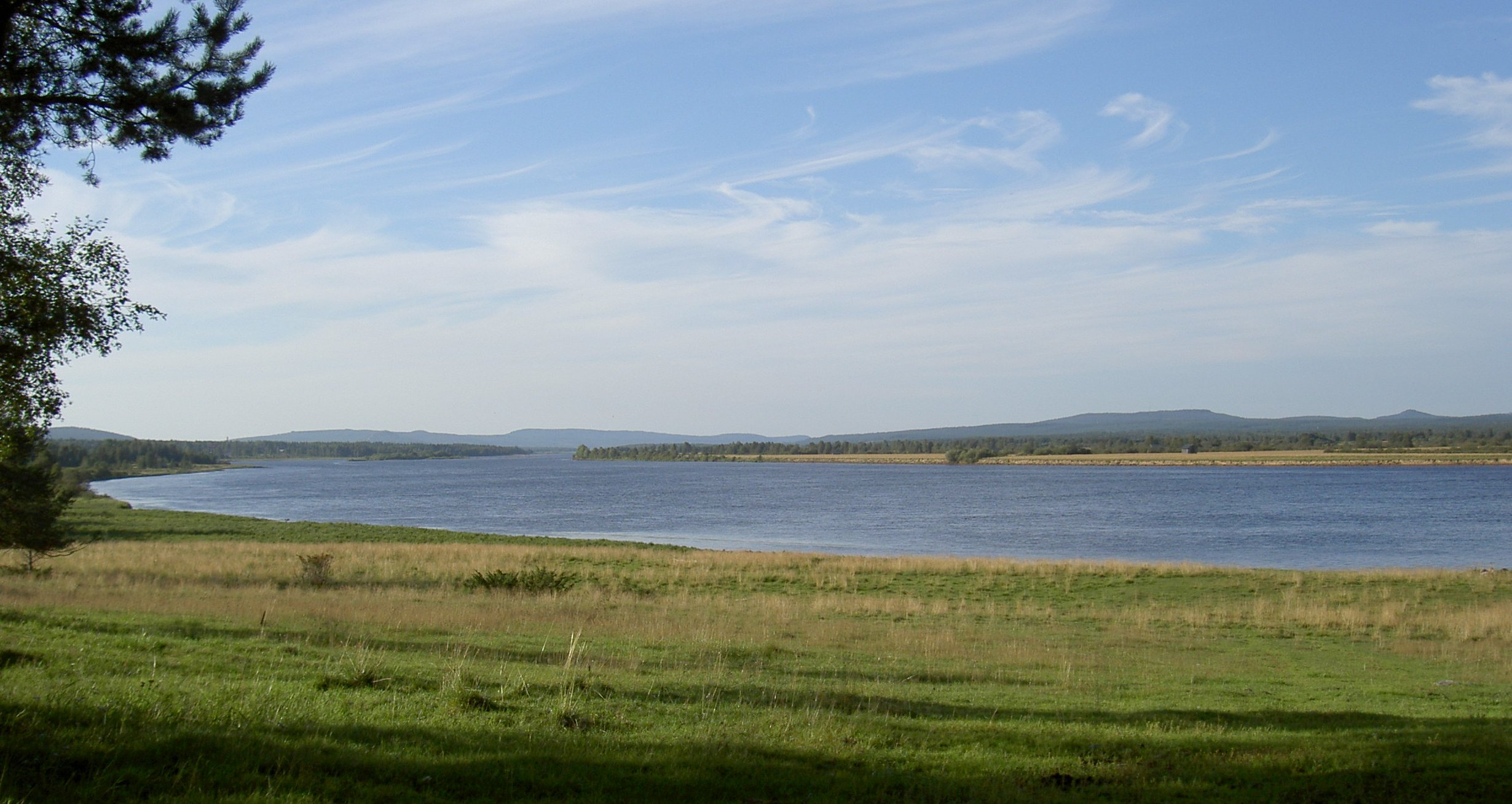 Torne älv norrut från kyrkudden i Hedenäset. Fastland till vänster, en holme till höger.